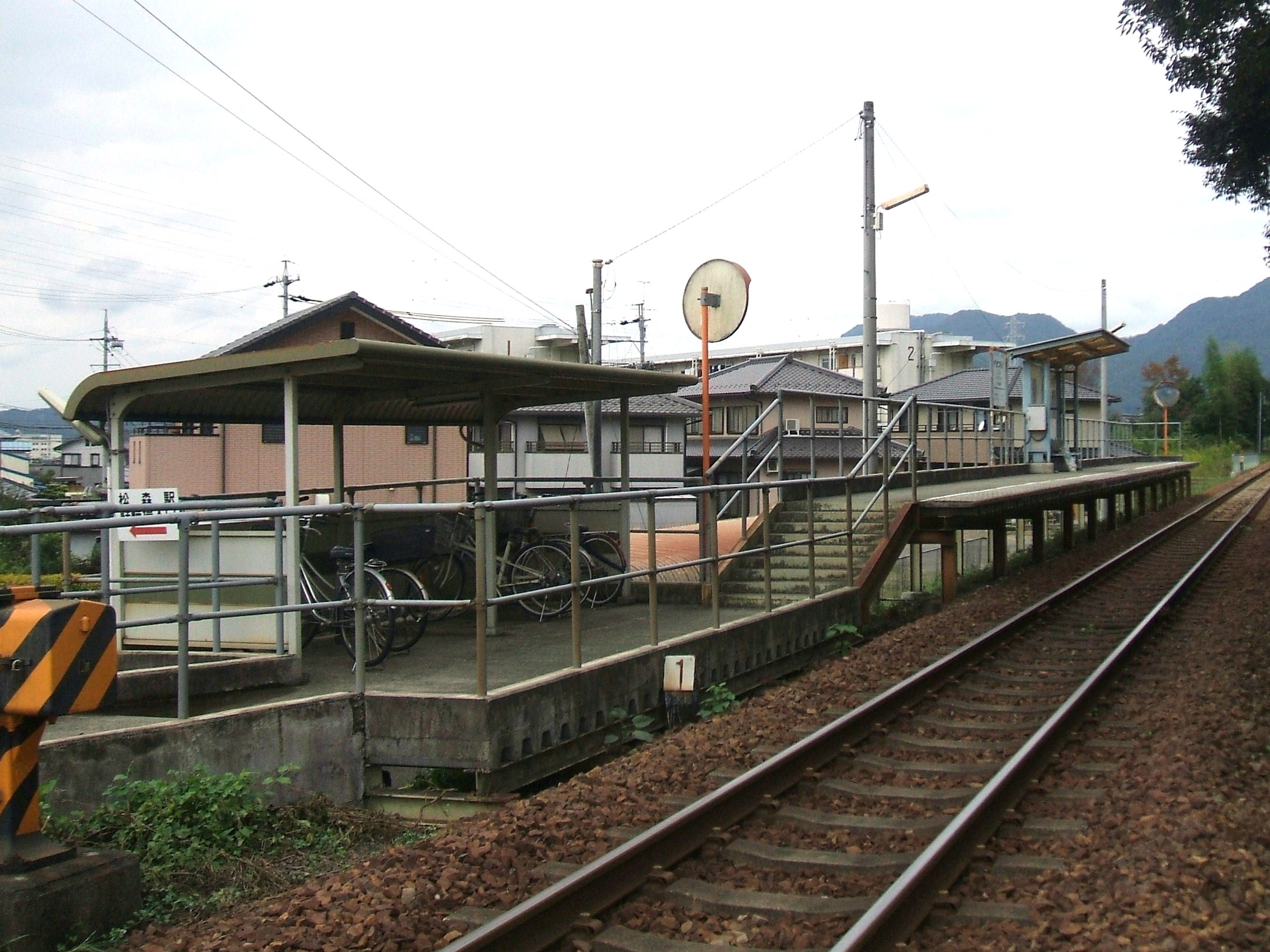 松森駅。